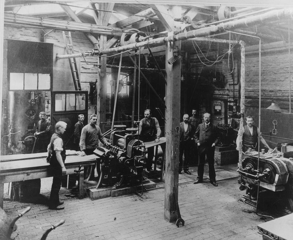 Grammophonfabrik der Brüder Joseph und Emil Berliner, Kniestraße 18, Hannover-Nordstadt